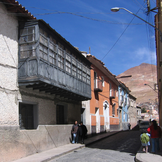 Potosi, Bolivia